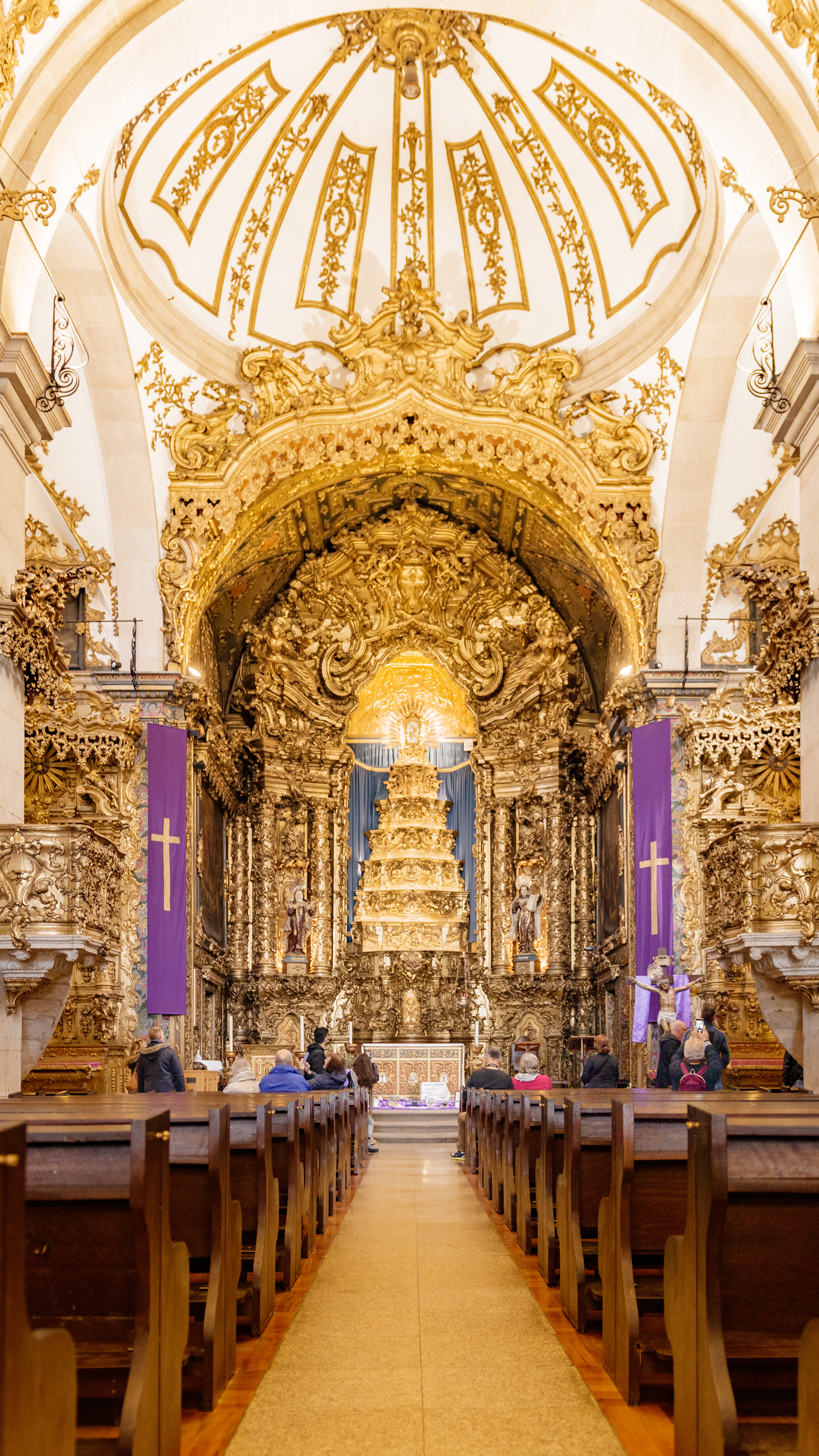 Nave e altar da Igreja dos Carmelitas Descalços por Rodrigo Tetsuo Argenton Cultural property Igrejas dos Carmelitas e do Carmo, Vitória, Cedofeita, Santo Ildefonso, Sé, Miragaia, São Nicolau e Vitória, Porto, Porto District, Portugal Q54797346, SIPA ID: 5497, DGPC ID: 155835 Wiki Loves Monuments ID: DGPC-155835